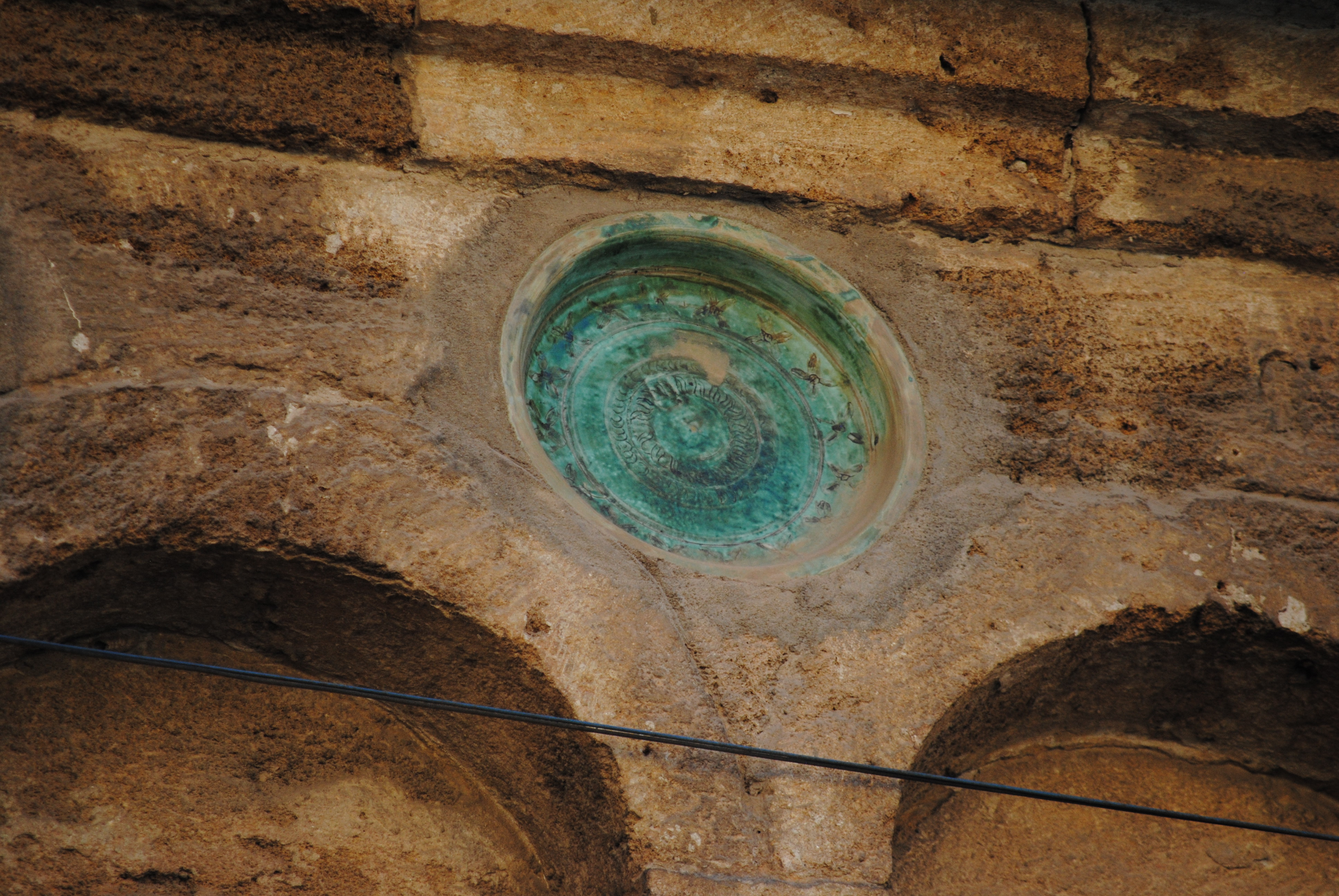 Bacino ceramico di importazione posto sulla muratura esterna della navata laterale della chiesa di San Sisto (Pisa). Il recipiente è posto sopra la giuntura degli archetti ciechi. Il pezzo originale è conservato presso il Museo nazionale di San Matteo a fini conservativi.